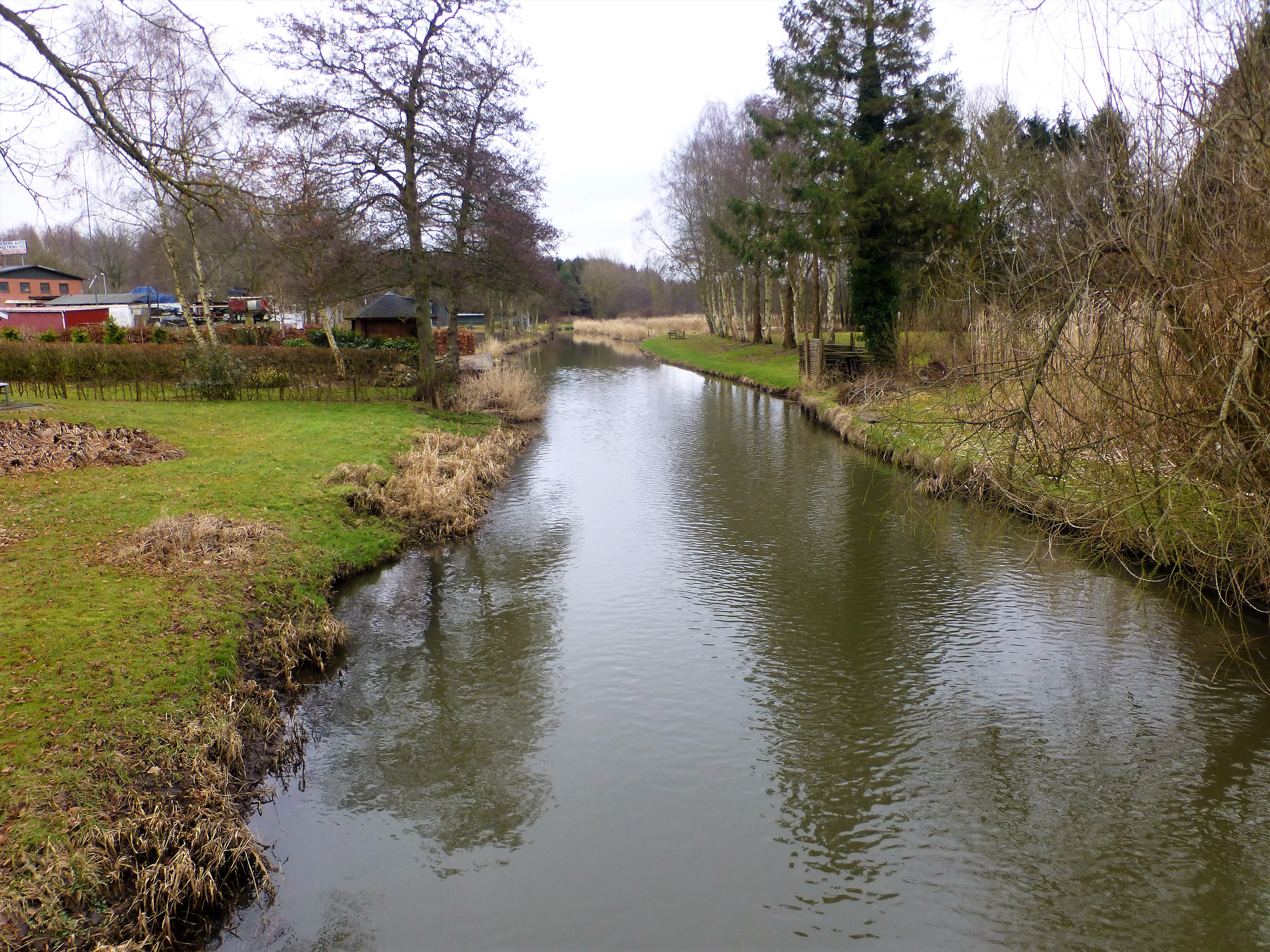 Lilleå ved Laurbjerg set mod øst